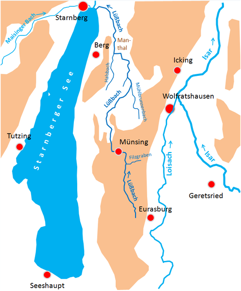 Verlauf des Lüßbachs